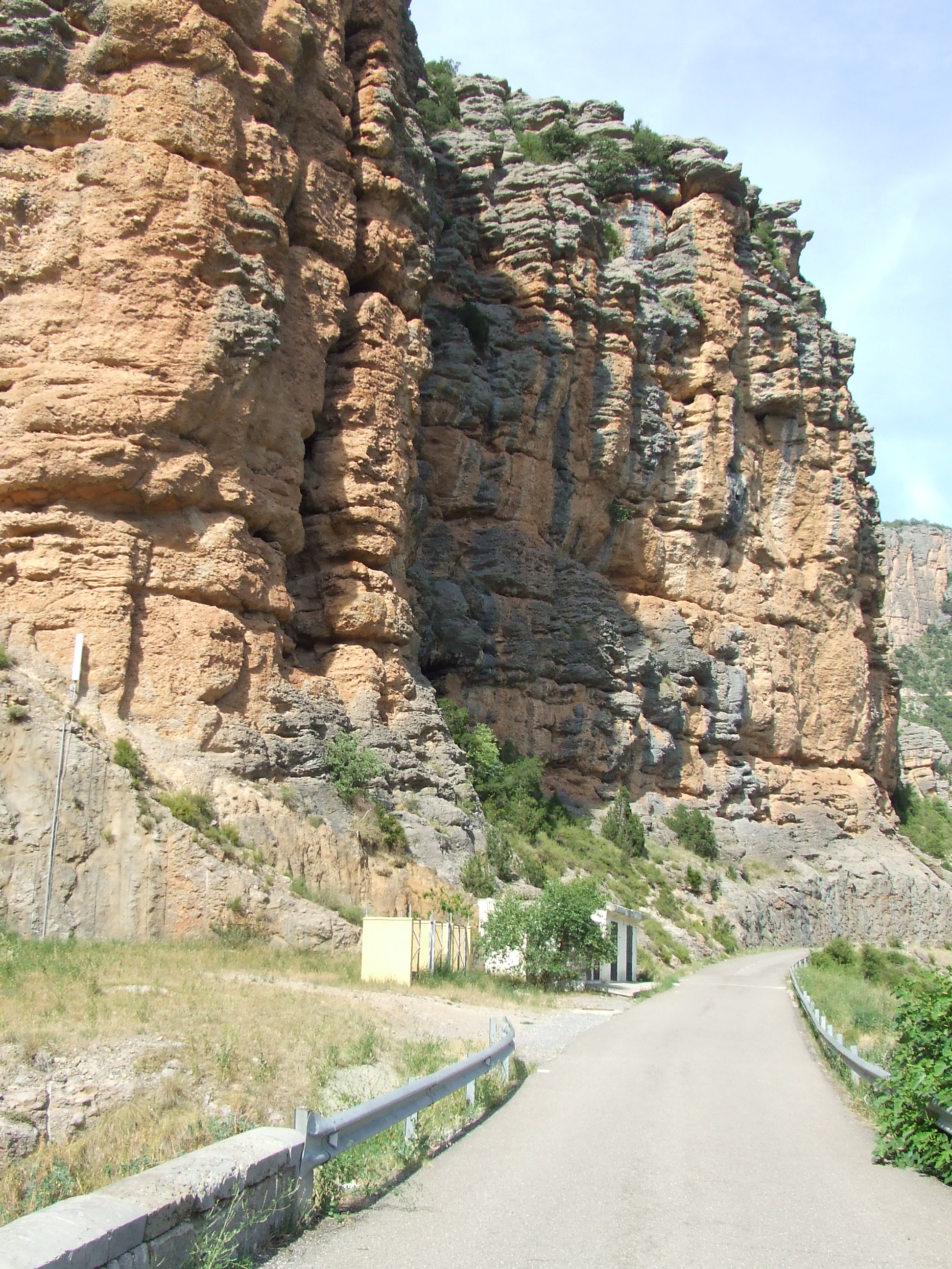 Lloc on era la Barraqueta, o Hostal del Pas, i la capella de la Mare de Déu de Montserrat, a Collegats (Gramuntill, la Pobla de Segur, Pallars Jussà)